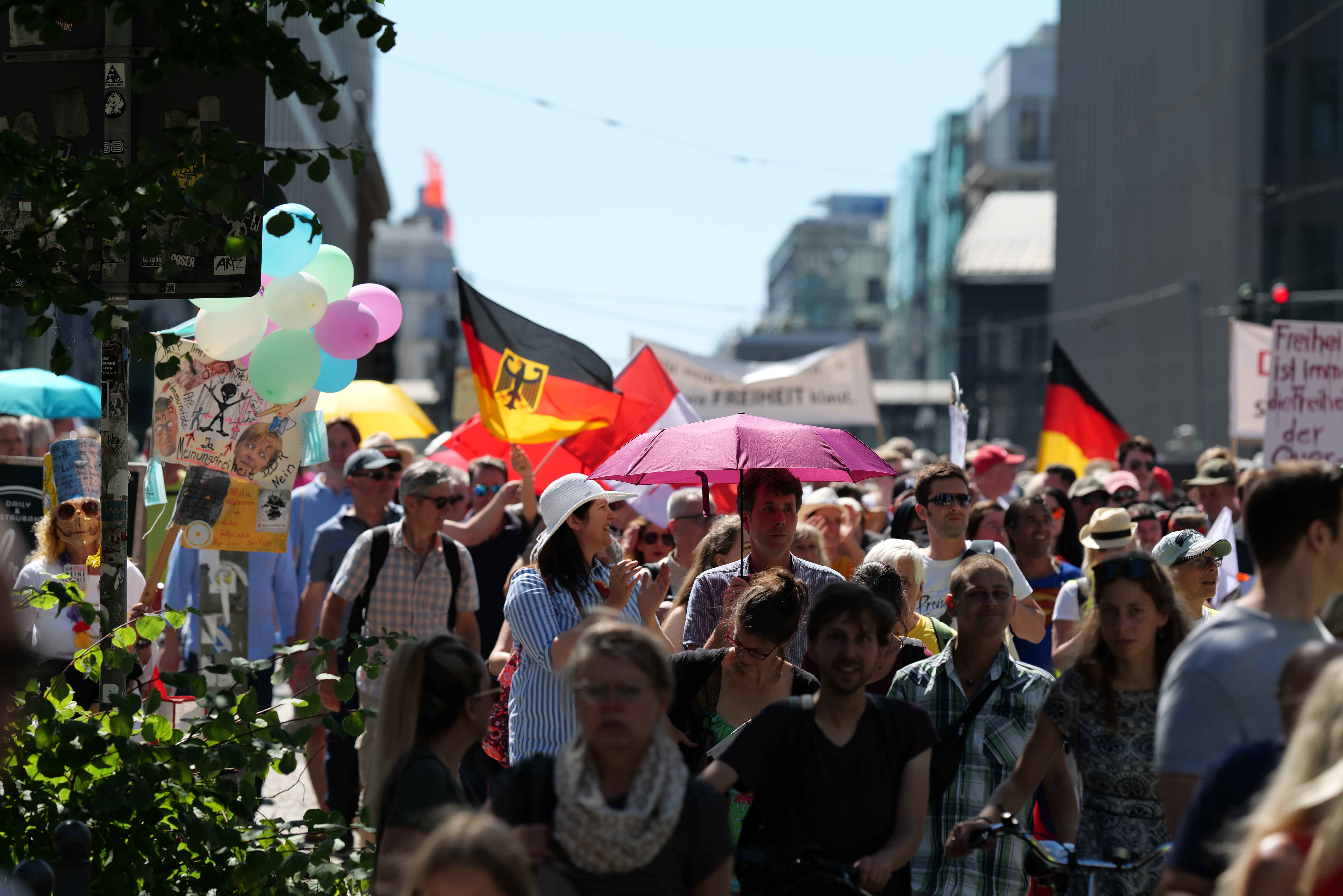 Demonstration von und Verschwörungsgläubigen und Rechtsextremen unter dem Motto „Tag der Freiheit – Das Ende der Pandemie“ gegen die Schutzmaßnahmen gegen das Coronavirus, gegen die bei der Demonstration demonstrativ verstoßen wurde, was zur formalen Auflösung der Demonstration und anschließenden Kundgebung führte am 1. August 2020 in Berlin.